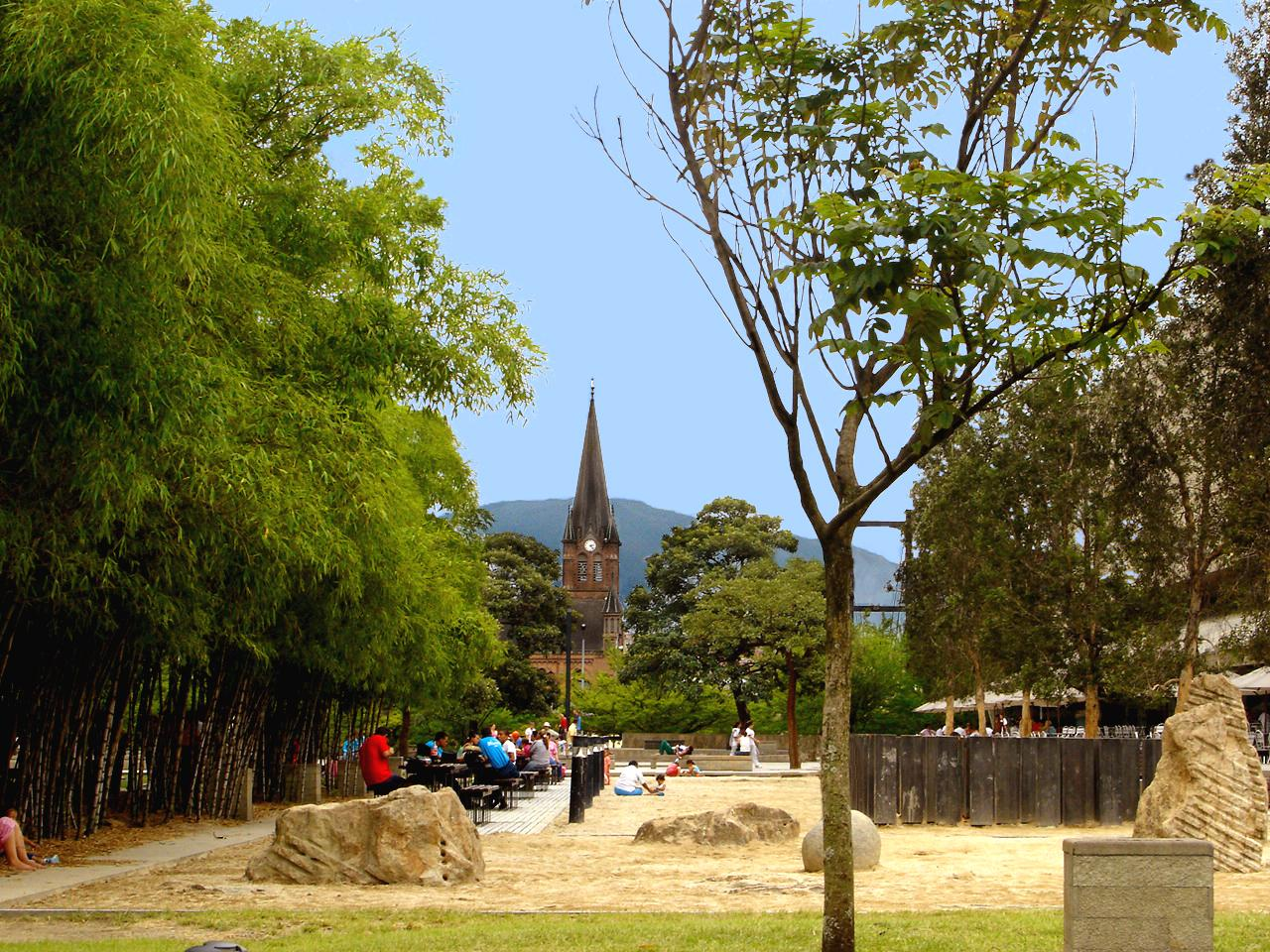 Detalle Parque de los Pies Descalzos, Medellín Image taken by uploader on October 23rd., 2006